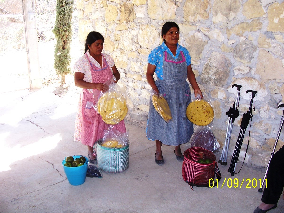 Vendedoras de tortillas y zapotes en San Juan Achiutla, Oaxaca, México